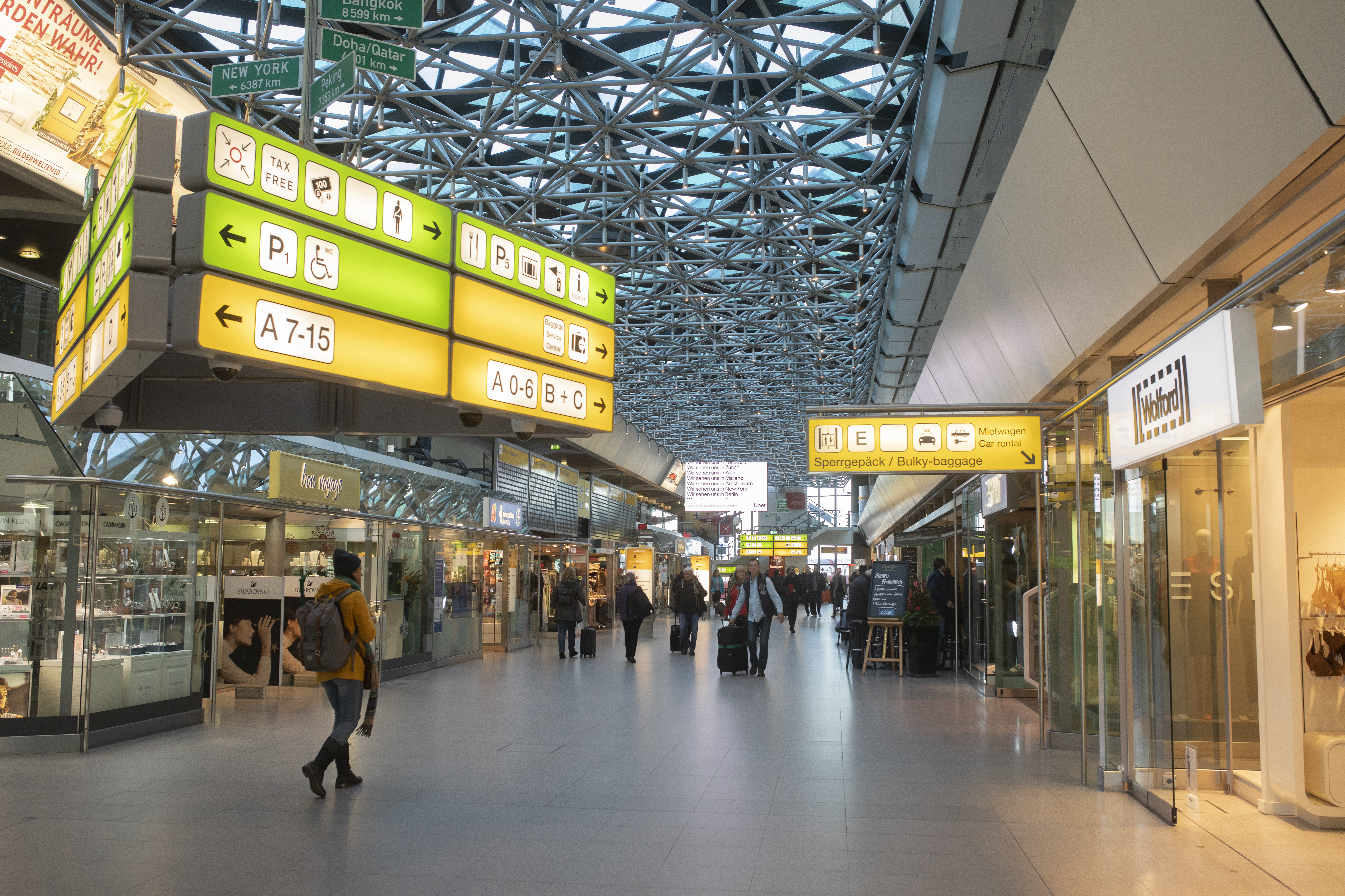 Terminal B des Flughafens Berlin-Tegel